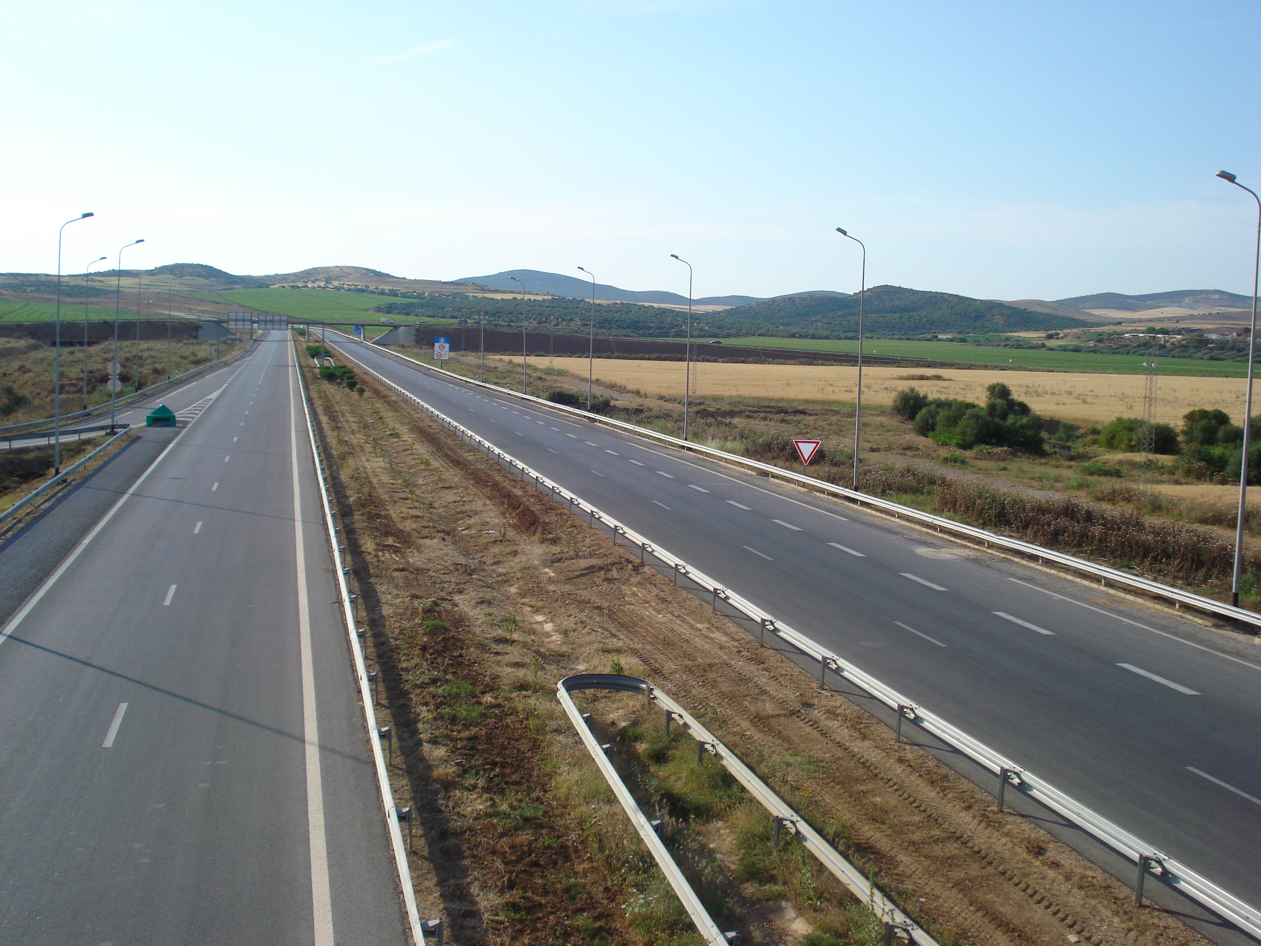 Autoroute Tunis-Béja (Tunisie)